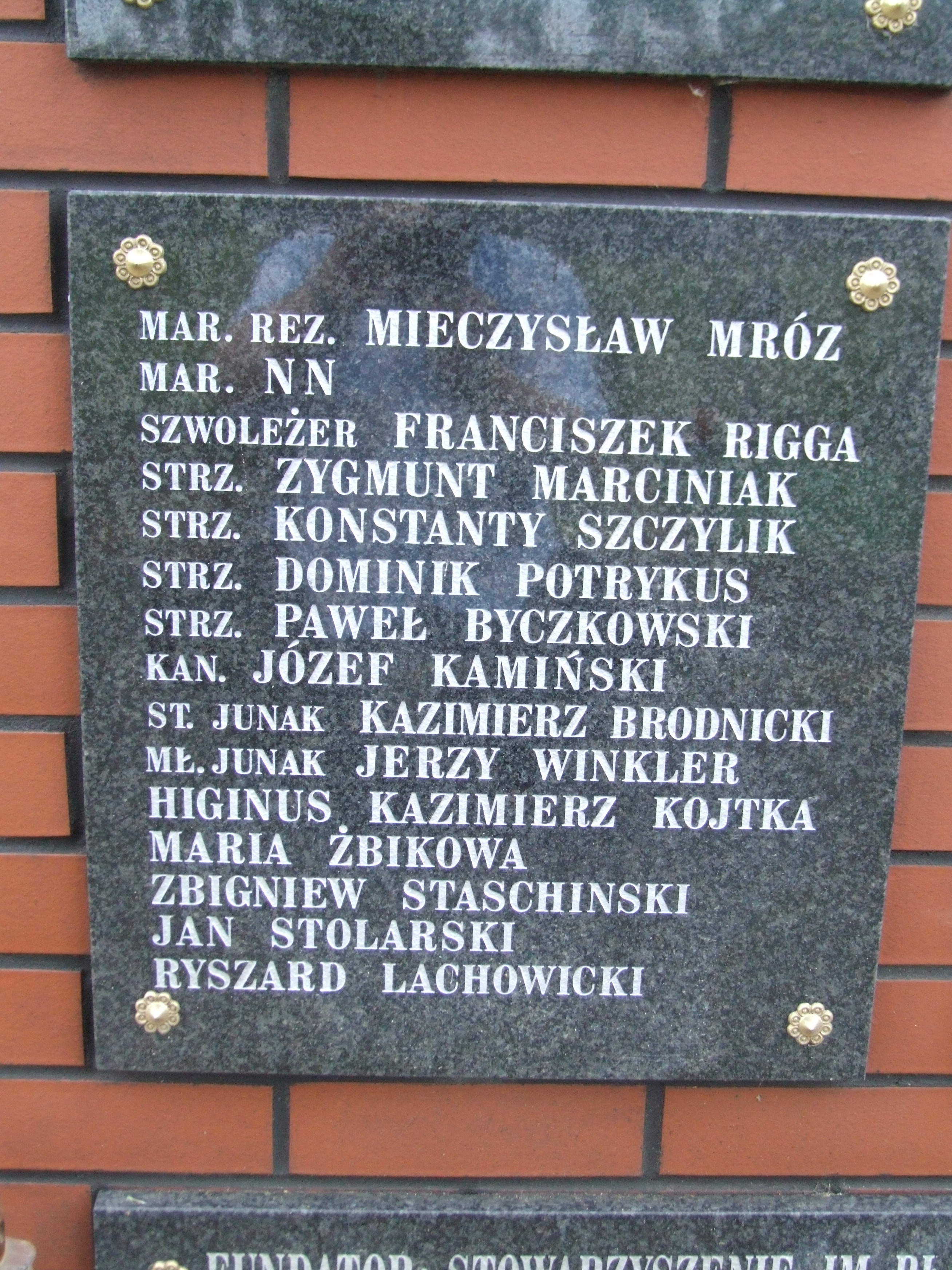 Gdynia-Oksywie Cmentarz Marynarki Wojennej